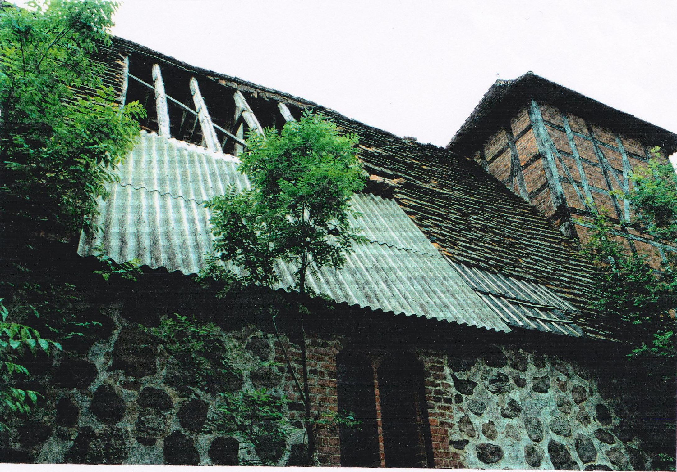 Offene und bewachsene Nordseite vom Dach der Dorfkirche Ruest